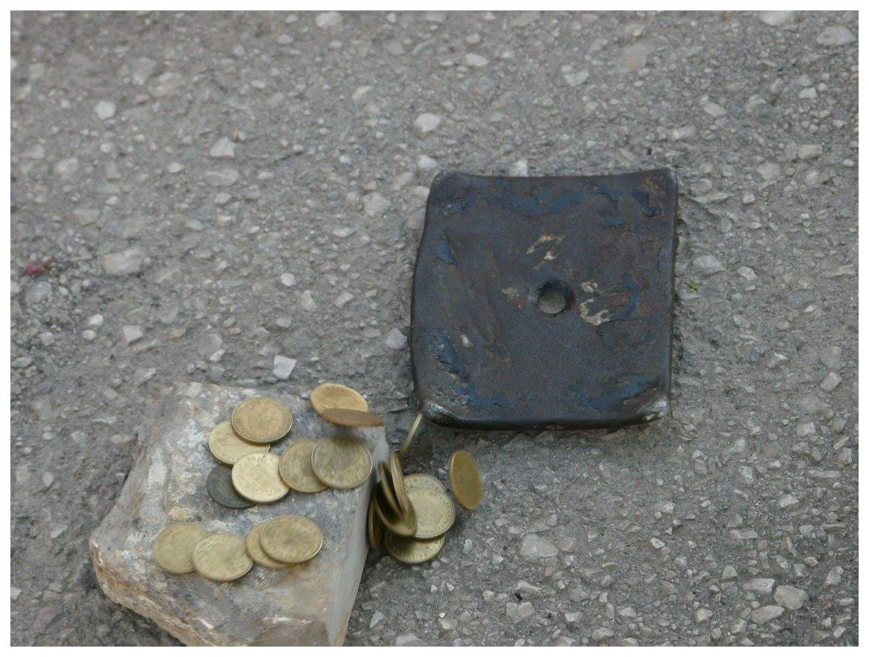 Tella, rebatell i monedes